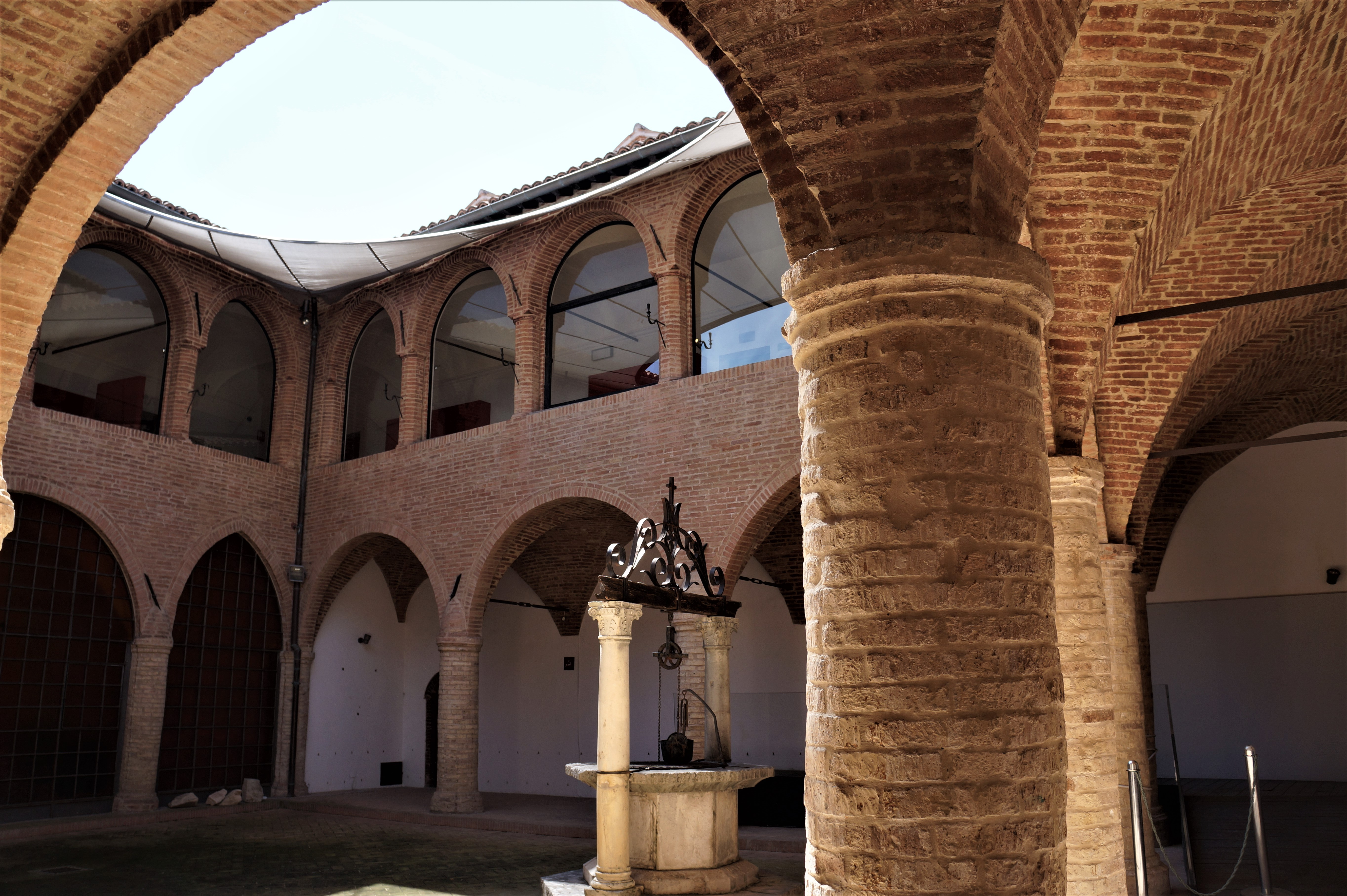 Spedale Santa Maria del Buon Gesù (Pinacoteca civica "Bruno Molajoli", chiostro) This is a photo of a monument which is part of cultural heritage of Italy.